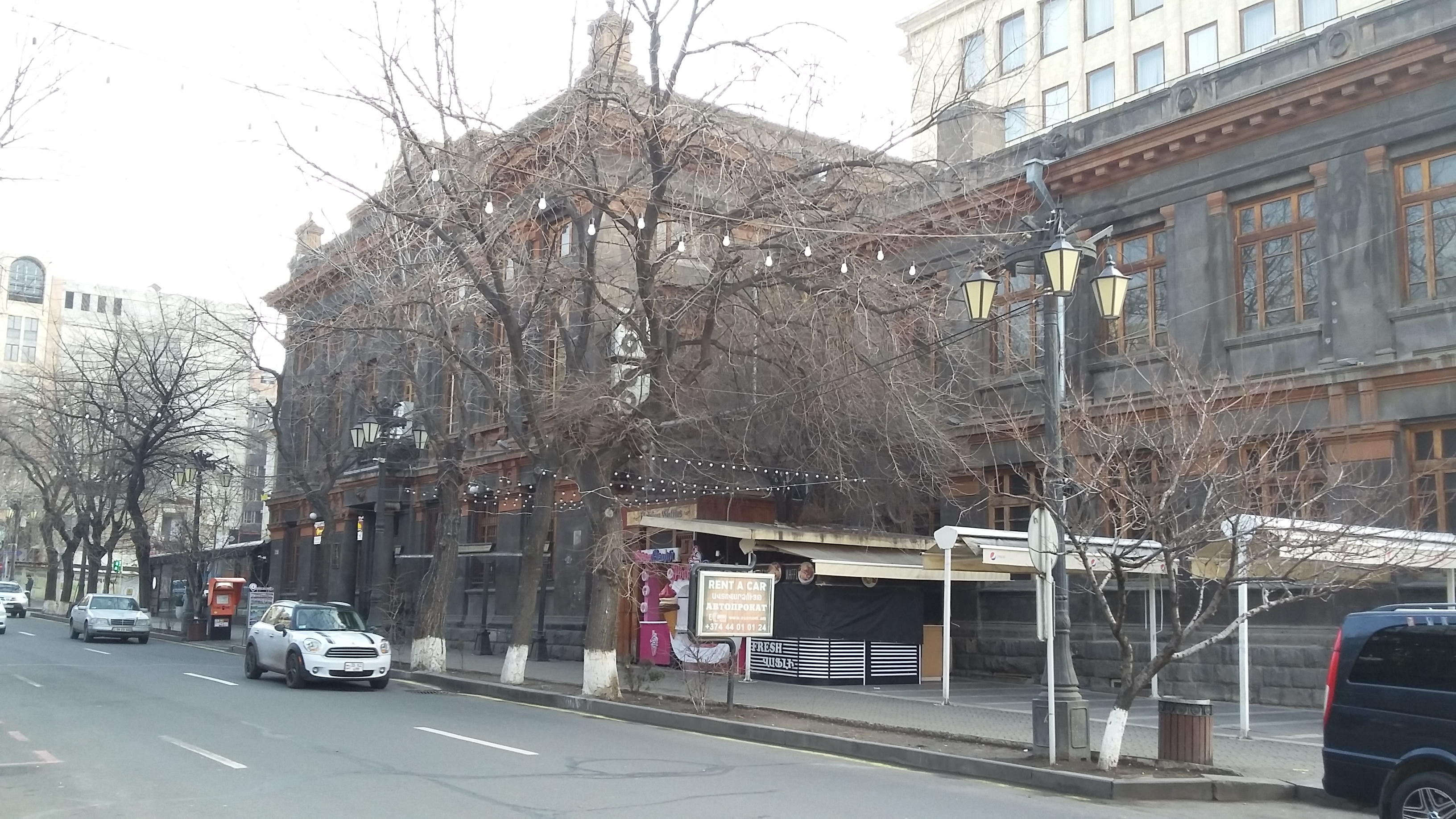 Աբովյան փողոց, Երևան